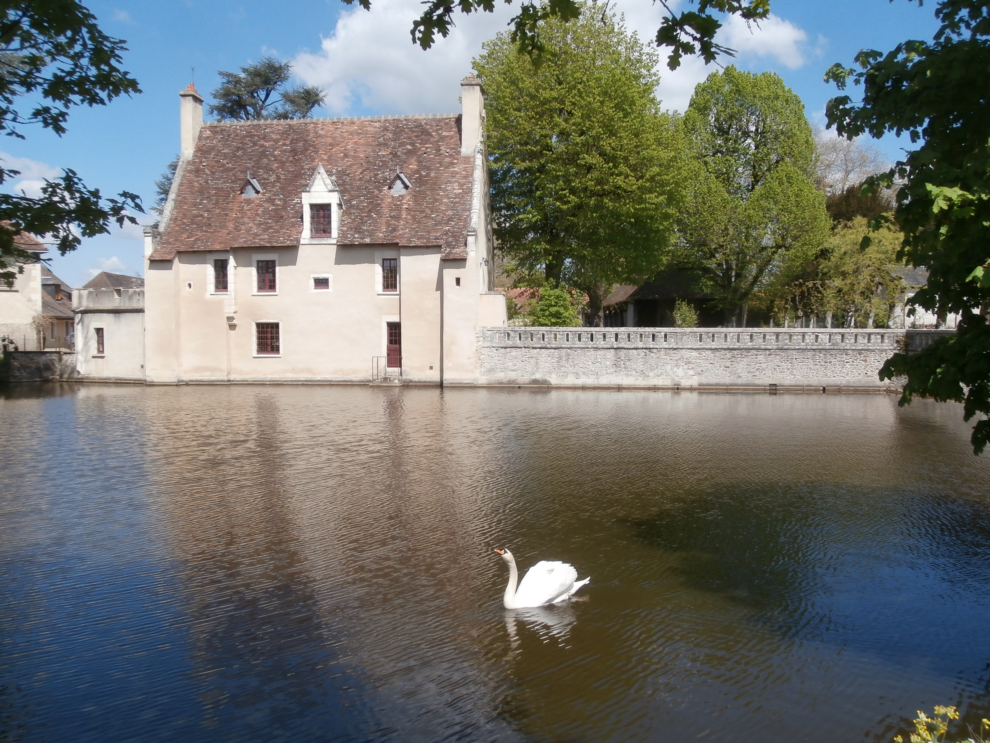 Abbaye vue depuis la route départementale 6